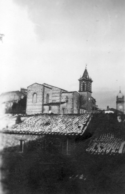 Veduta posteriore della Pieve della Santissima Annunziata in una foto scattata nella seconda metà degli anni '30 del Novecento.